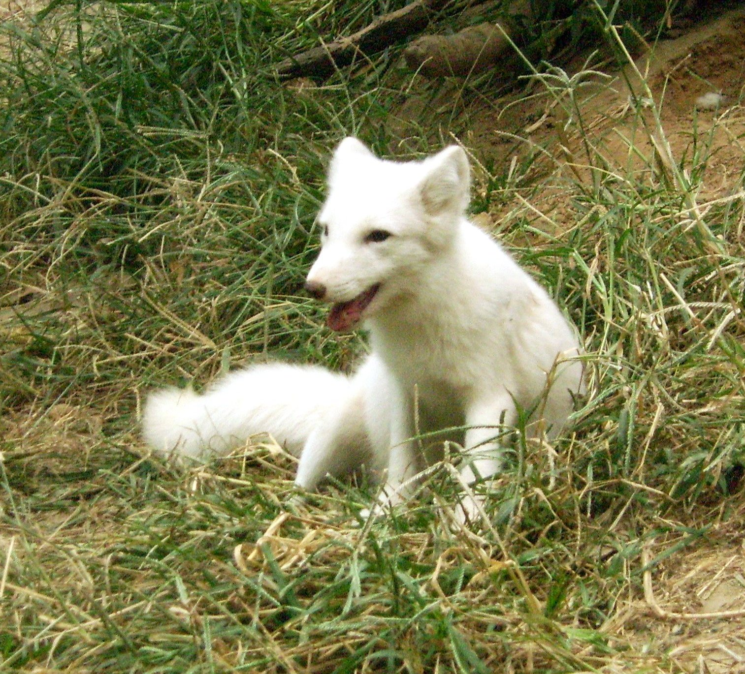 北京动物园的白狐